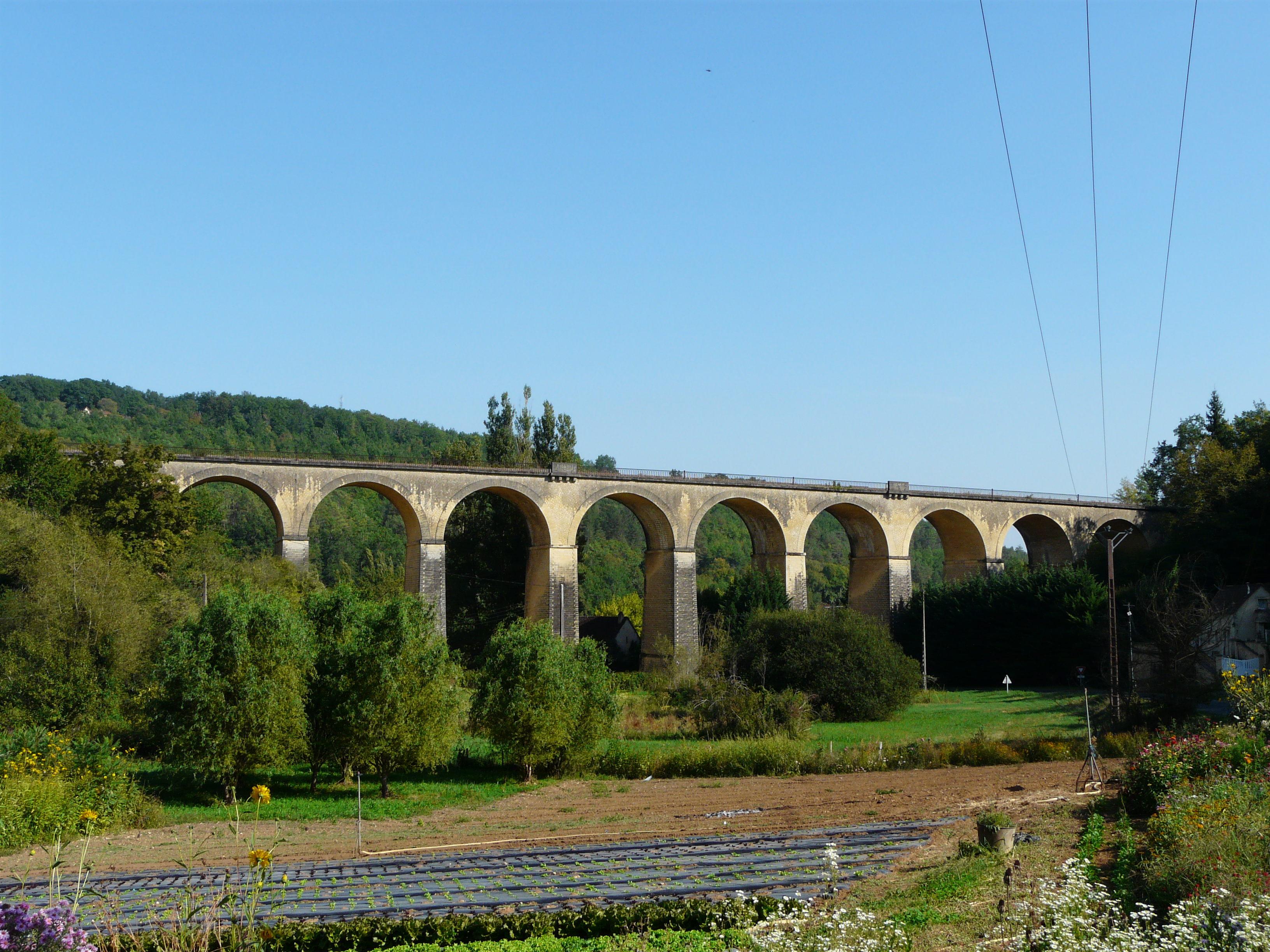 Le viaduc de Miremont, Mauzens-et-Miremont, Dordogne, France.